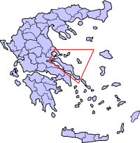 Северные Спорады на карте Греции